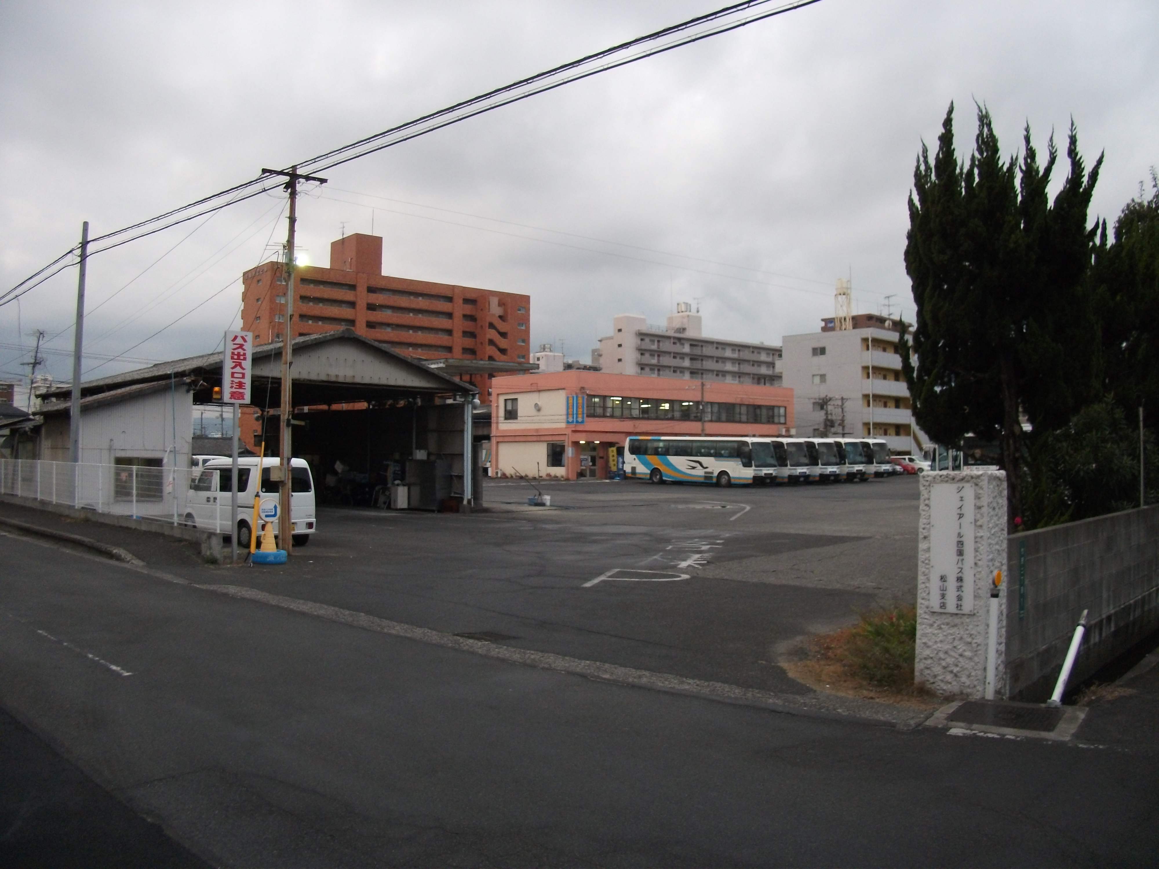 ジェイアール四国バス松山支店（愛媛県松山市竹原二丁目）